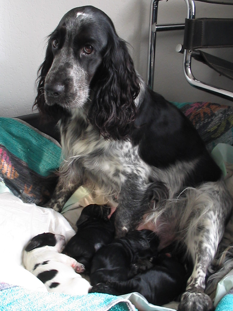 Cocker spaniel puppies bij moeder Elbi